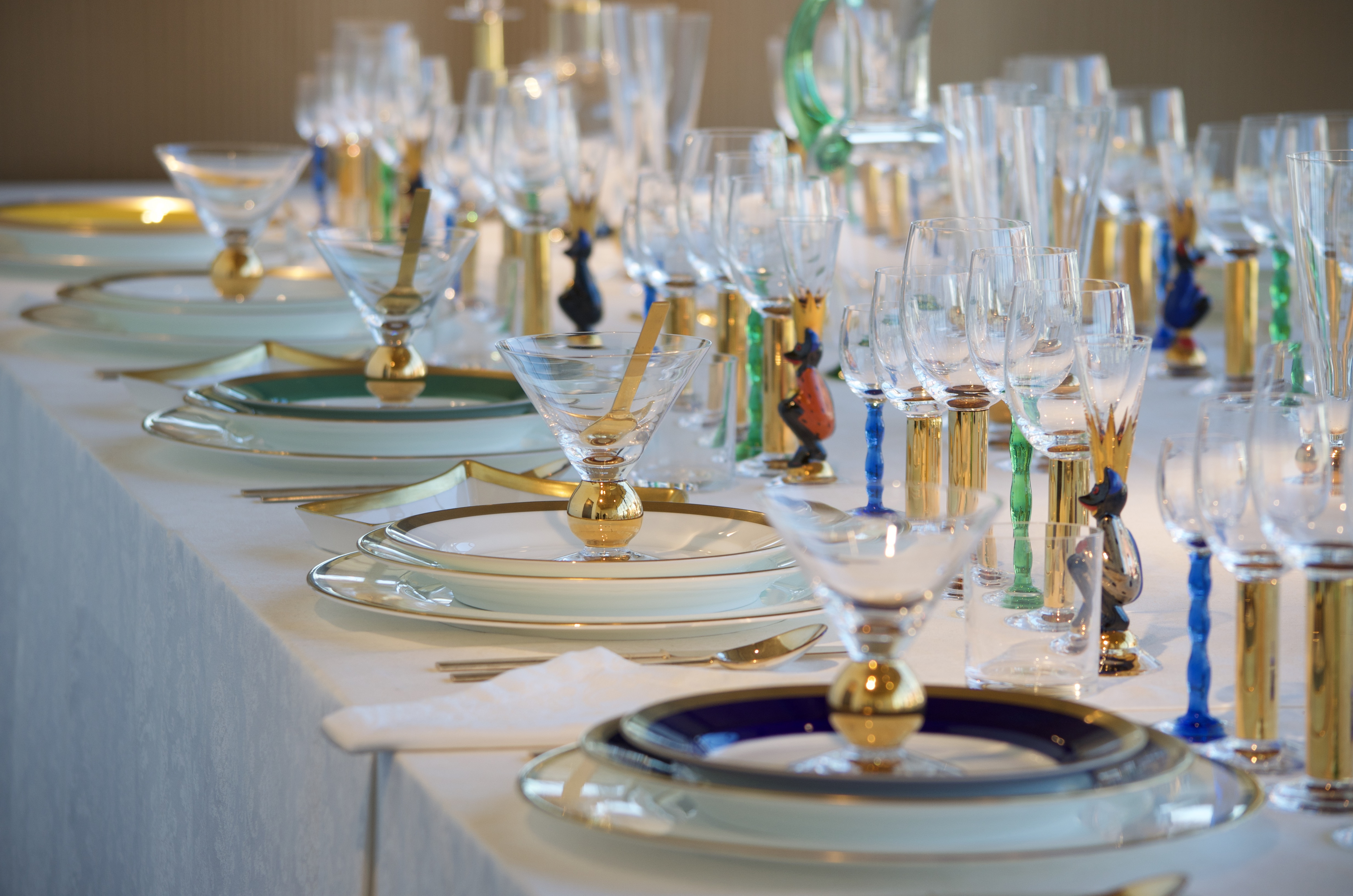 Nobelservisen vid Glasrikets Skatters Cyrén-utställning i Orrefors glasbruks utställningshall 2012